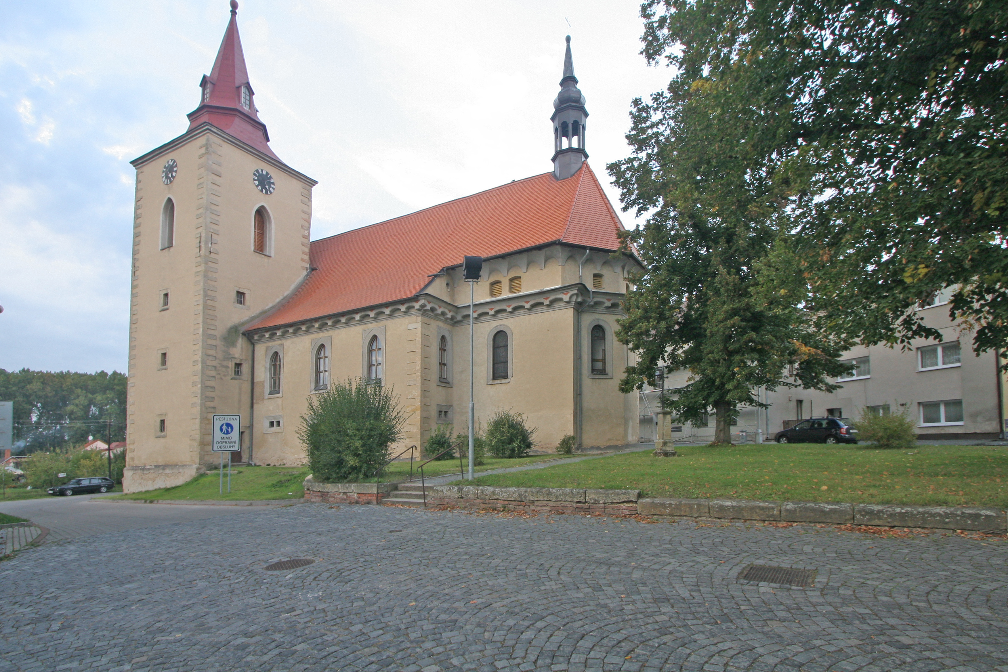 Kostel sv. Bartoloměje (Bakov nad Jizerou), nám. Mírové, Bakov nad Jizerou